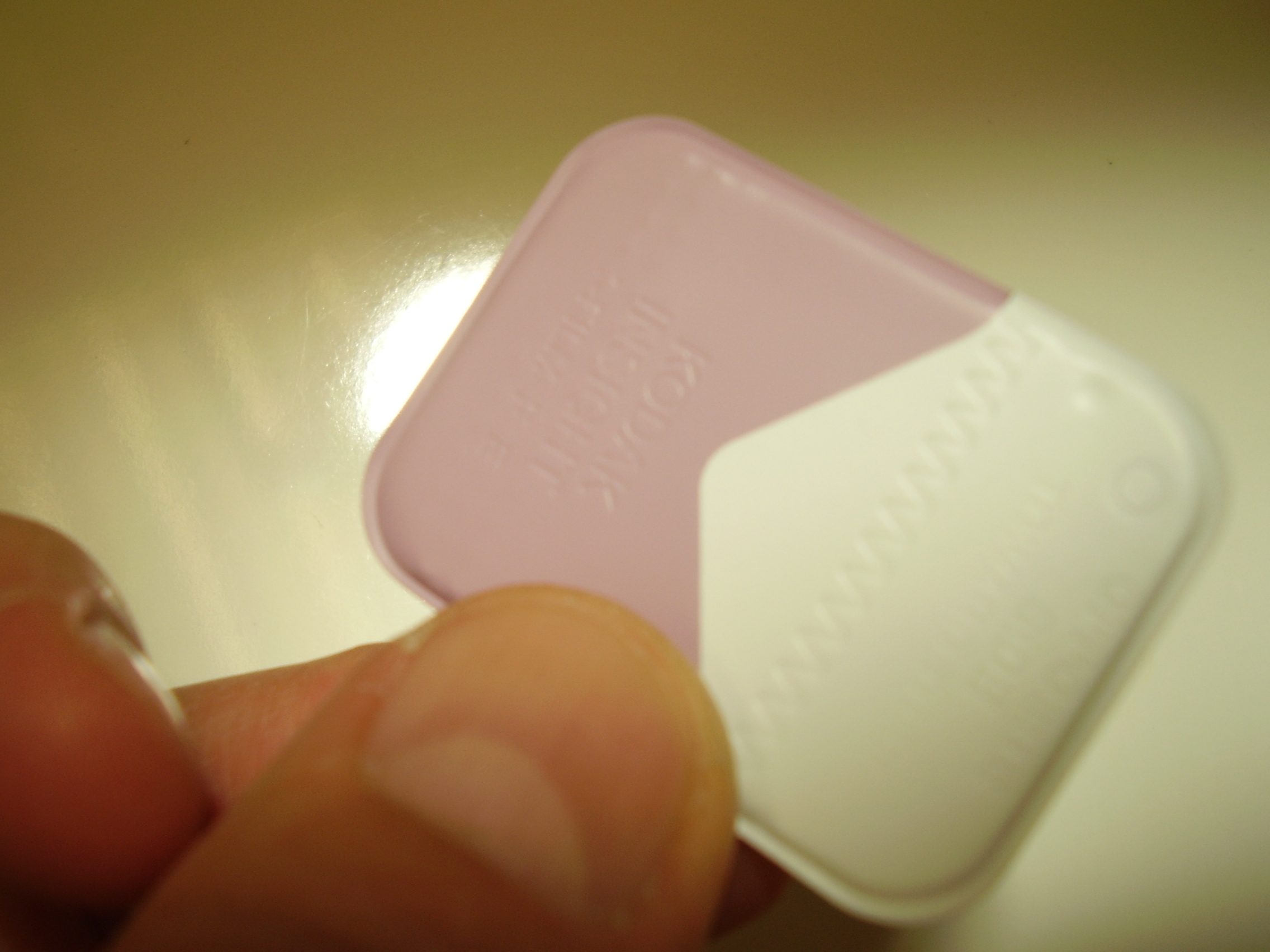 dental x-ray film